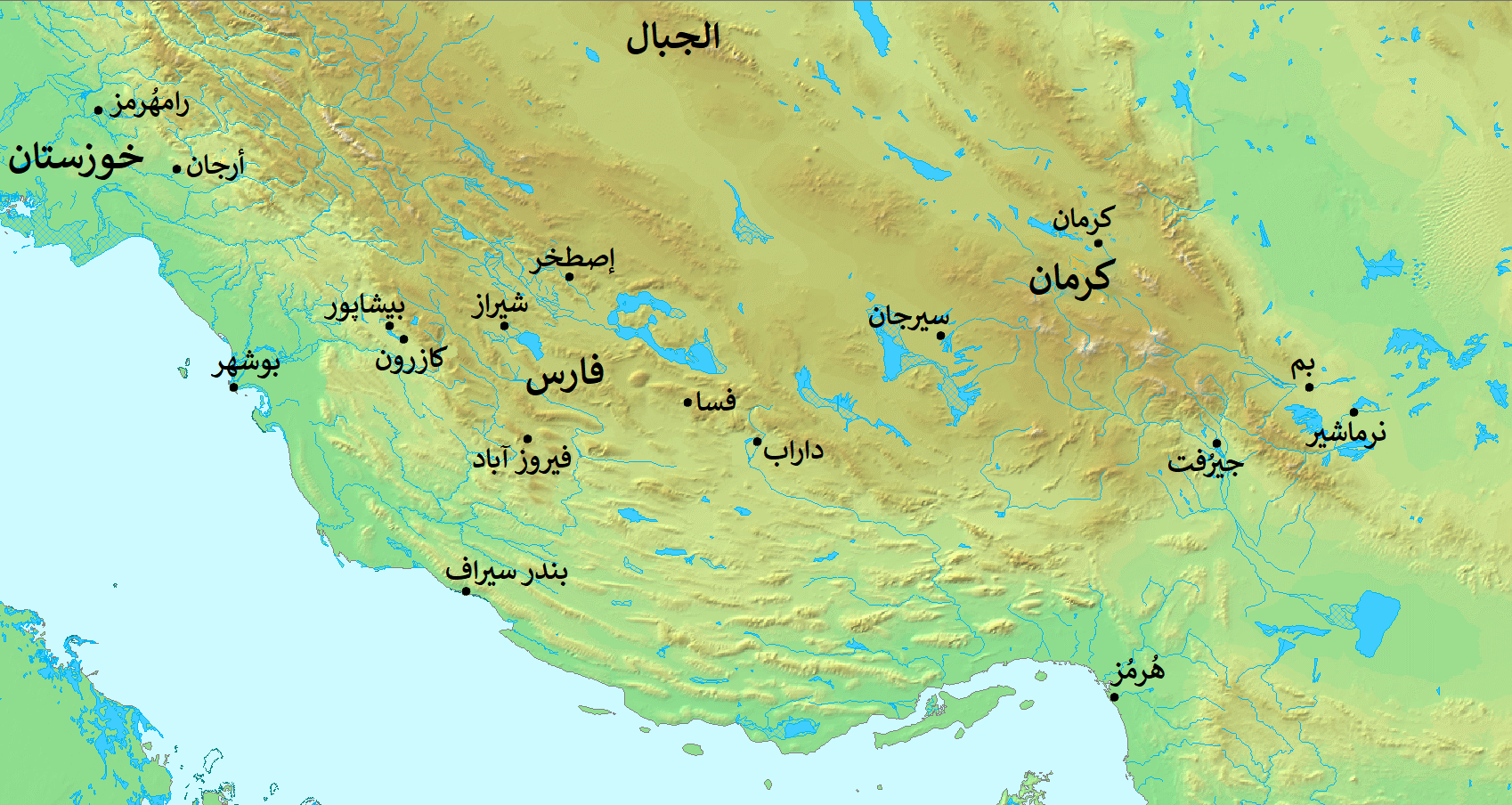 خريطة لِفارس والمناطق المُجاورة لها.